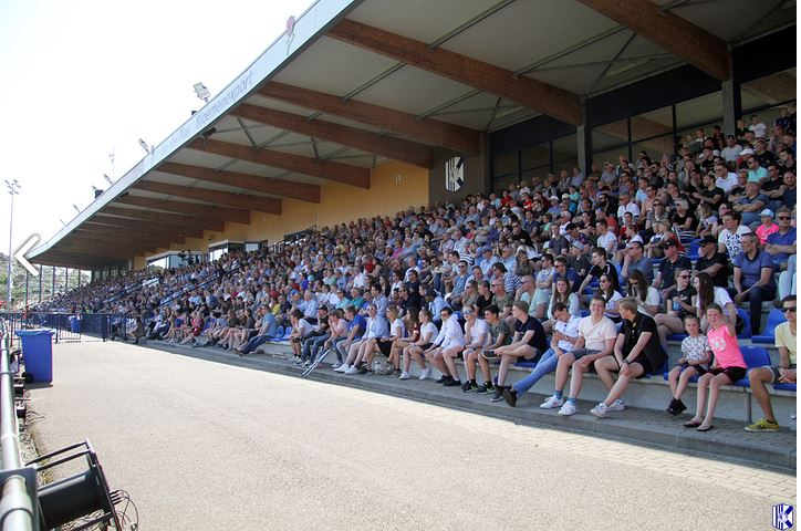 De bezoekersaantallen op Nieuw Zuid liggen voor amateurbegrippen zeer hoog.